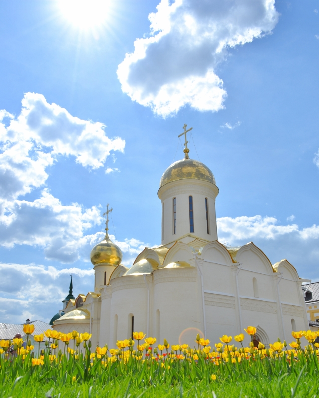 Троицкий собор в Троице-Сергиевой Лавре, Сергиев Посад